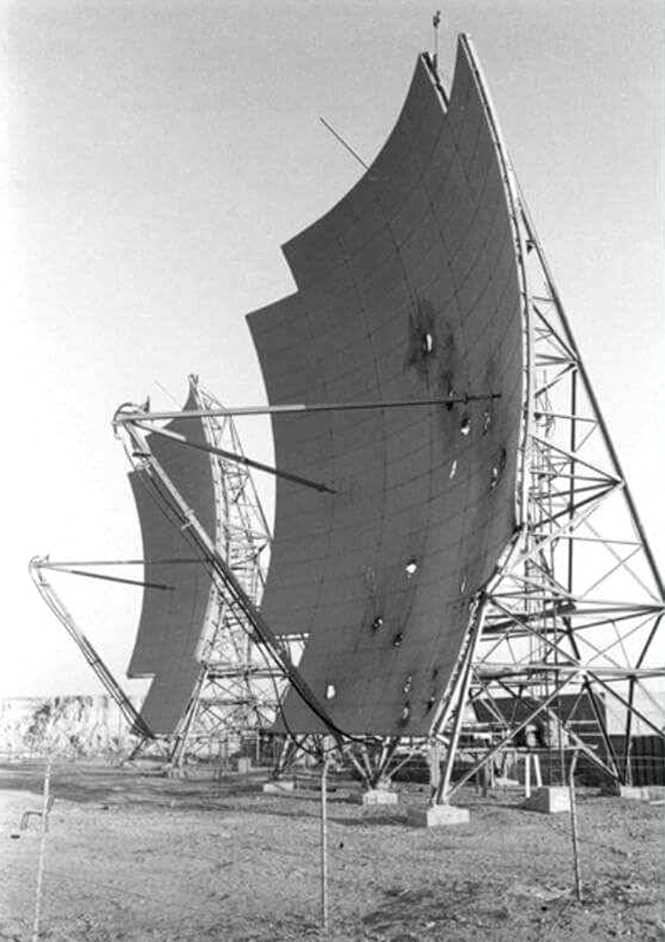 אנטנות הקשר הטרופוספירה בשארם א-שייח'